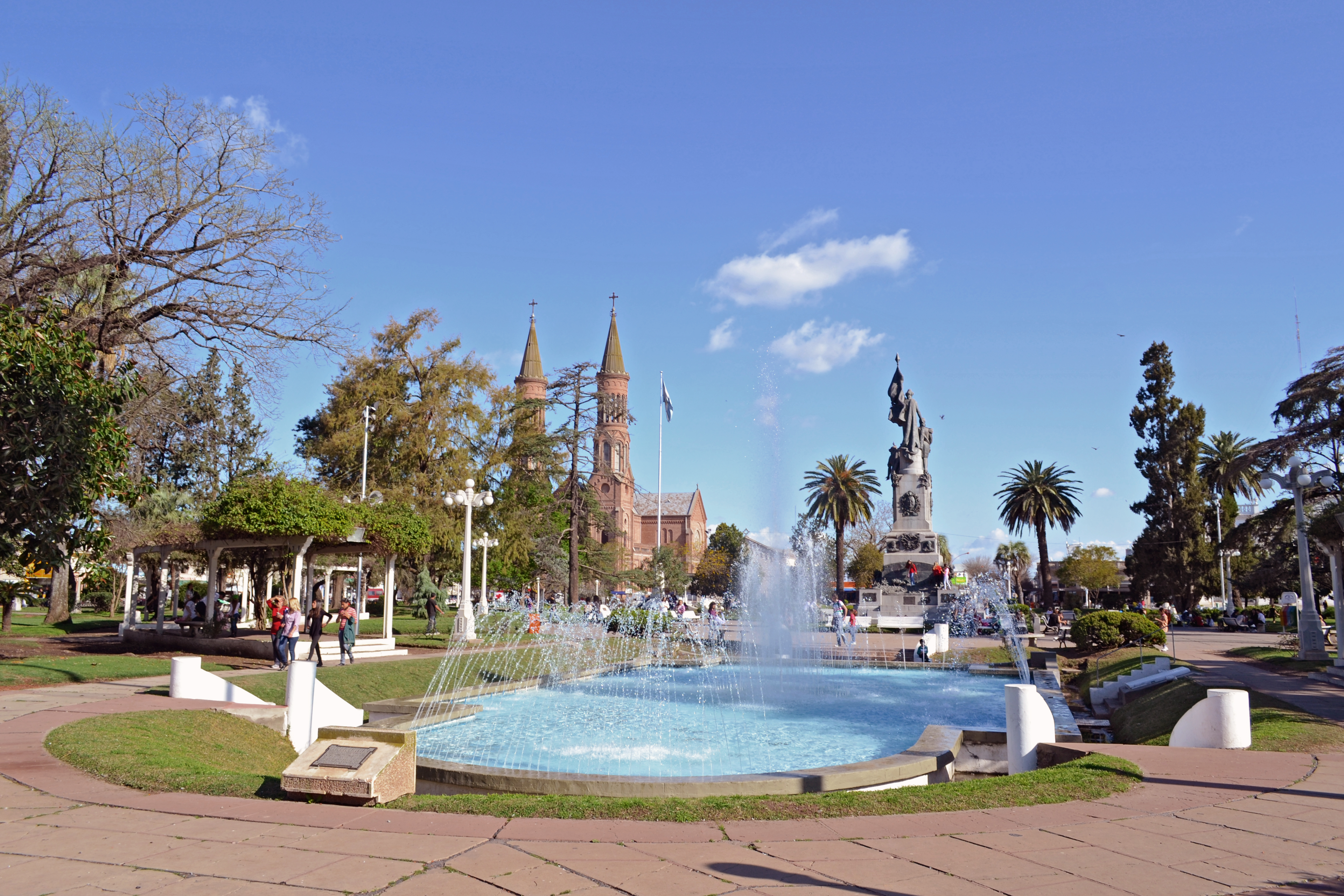 Plaza de la Ciudad de Esperanza